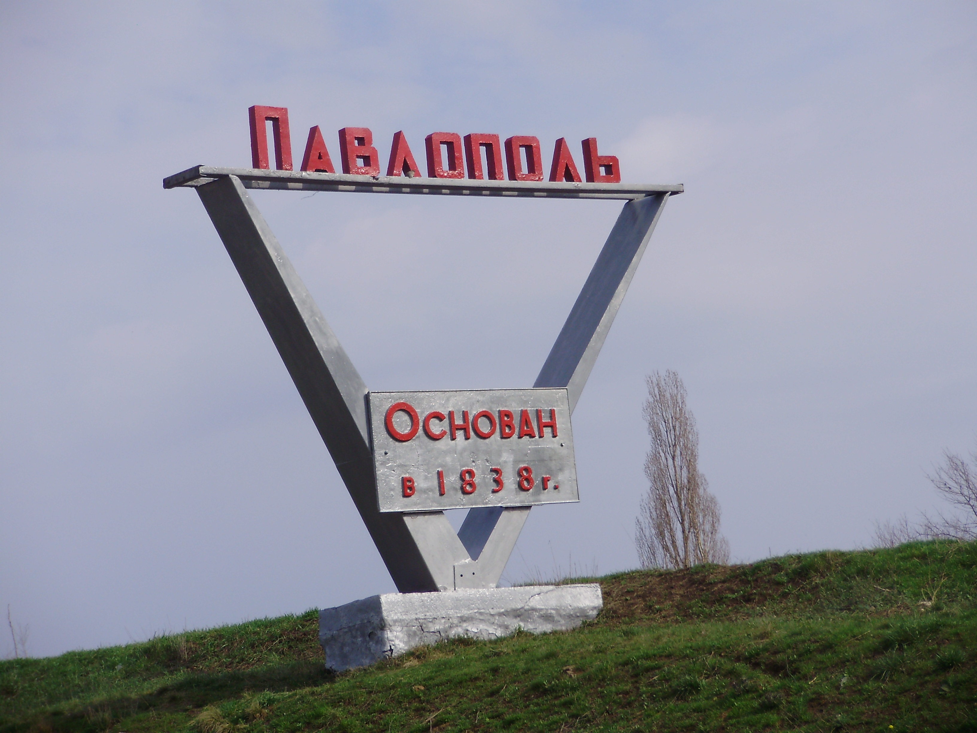 В'їзд до села